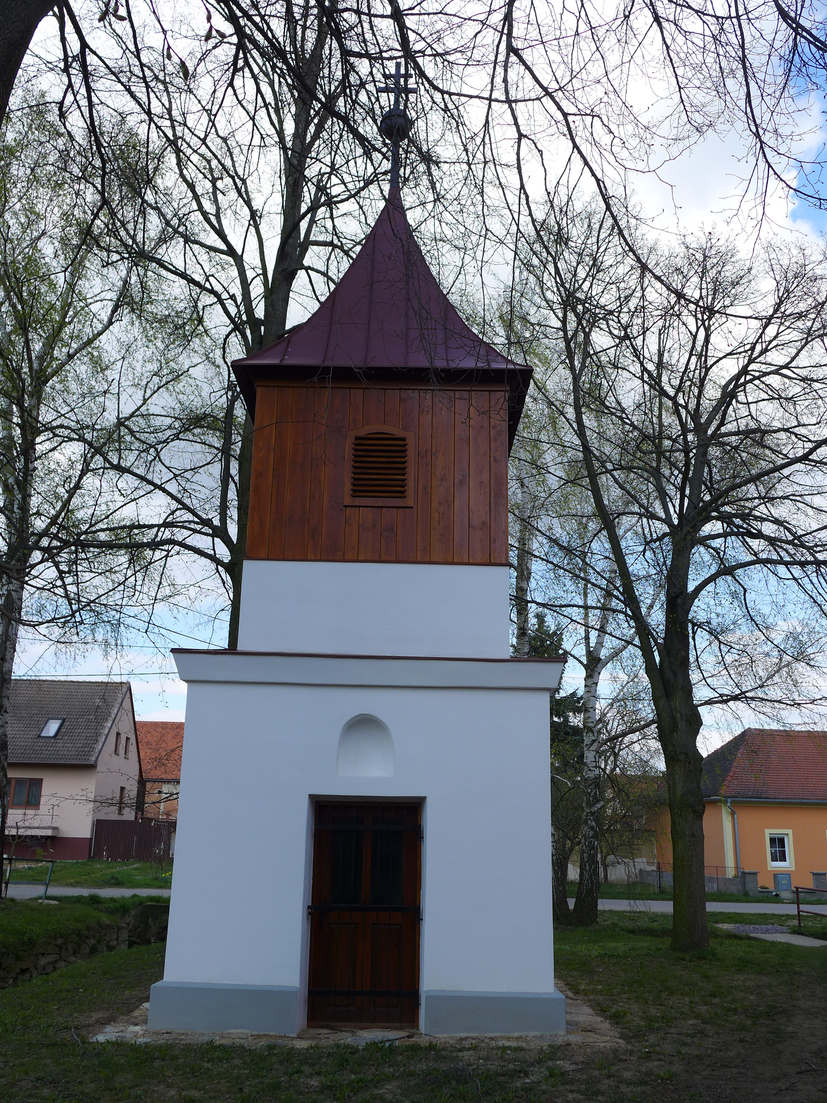 Kaplička, náves, Dobronice (Tavíkovice).